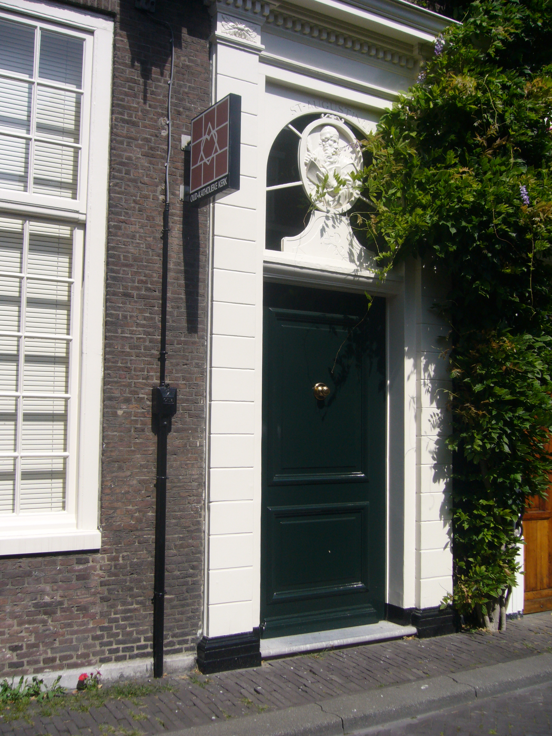 Molenstraat Den Haag, ingang van schuilkerk, boven de deur beeltenis van St Augustinus